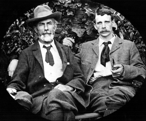 Edward Carpenter à gauche et George Merrill à droite v. 1900